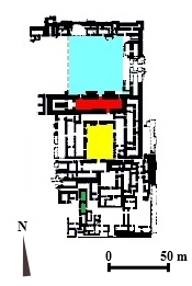 Palais nord-ouest de Kalkhu/Nimrud. Rouge : salle du trône ; bleu : cour centrale du babanu (partie publique) ; jaune : cour centrale du bitanu (partie privée) ; vert : tombes des reines.